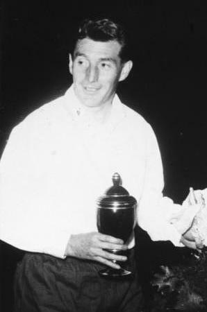 Title: SC Wismut gegen 1. FC Kaiserslautern Factual corrections and alternative descriptions are encouraged separately from the original description. Additionally errors can be reported at this page to inform the Bundesarchiv. Original historic description: Zentralbild/Franck/Opitz 7.10.1956 SC Wismut Karl-Marx-Stadt unterlag 1. F.C.Kaiserslautern 5:3 Der 2. Fussballgrosskampf am gestrigen Sonnabend, dem 6.10.1956, zwischen dem 1. F.C.Kaiserslautern und dem SC Wismut Karl-Marx-Stadt unter Tiefstrahlern im Leipziger Zentralstadion wurde ein Triumph vor hunderttausend Zuschauer der Lauterer. UBz: Die beiden Mannschaftskapitäne Fritz Walter (1.FC) und Bauer (rechts).